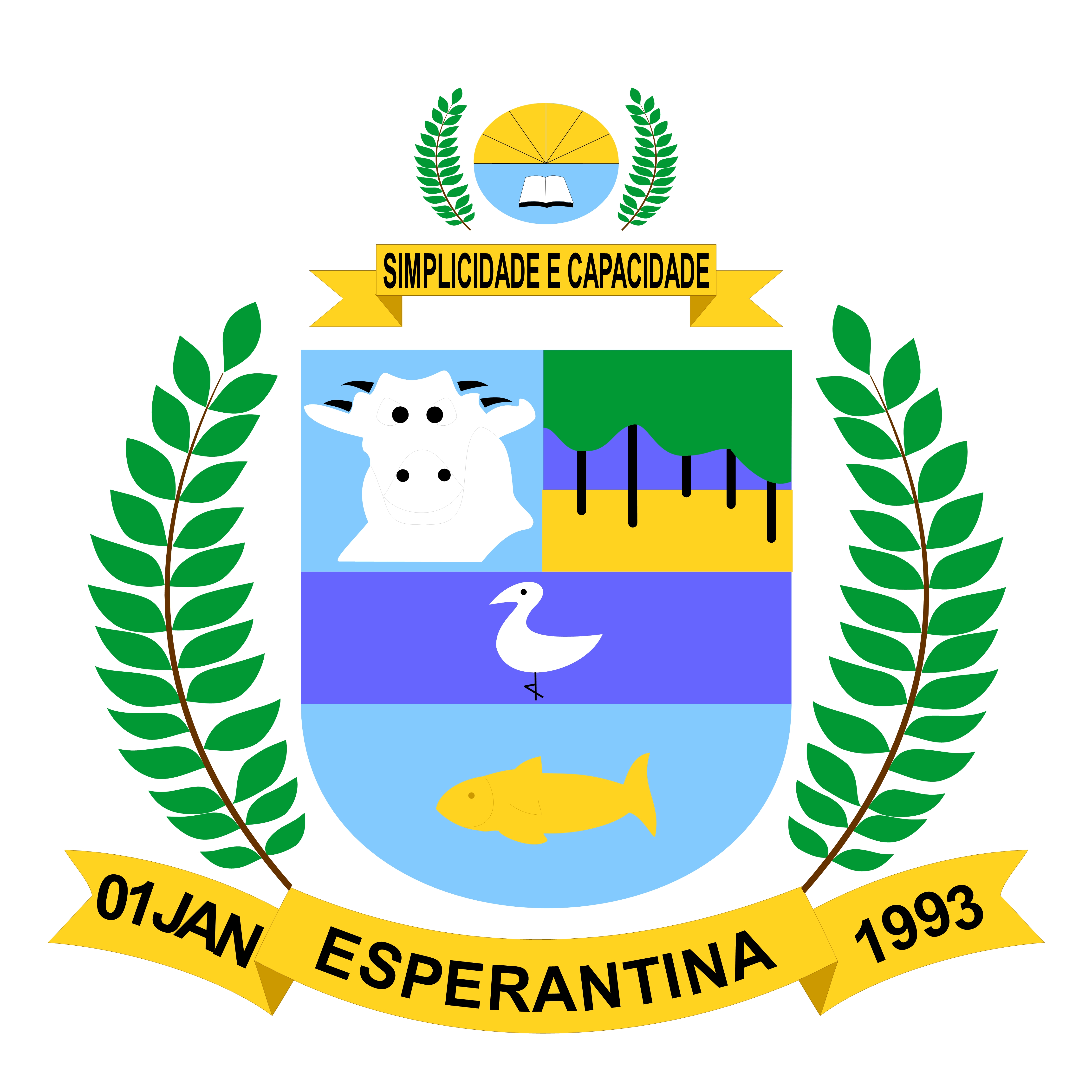 Brasão do município brasileiro de Esperantina-TO.